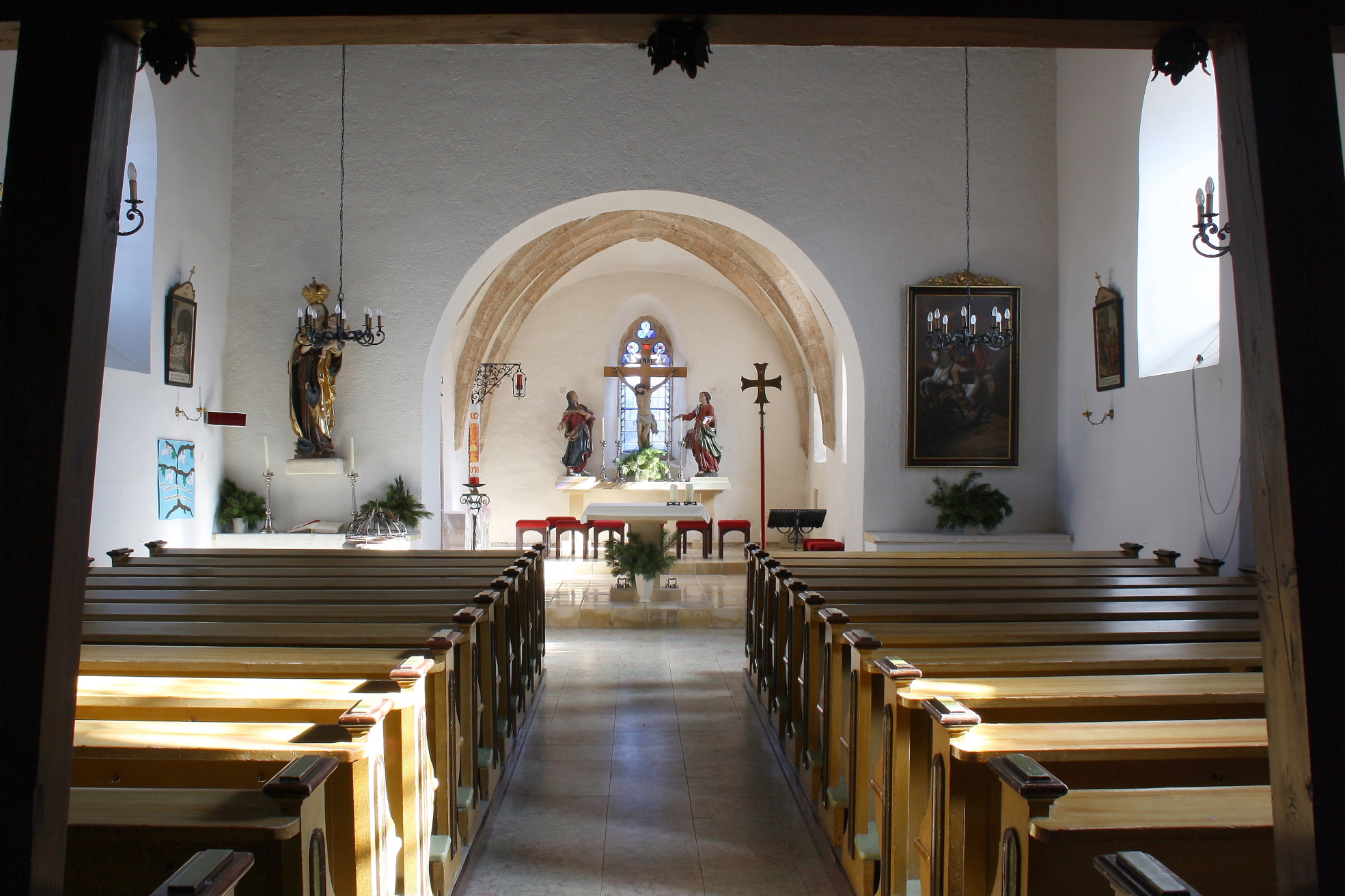 Innenansicht Richtung Altar der röm.-kath. Pfarrkirche von Dreistetten.